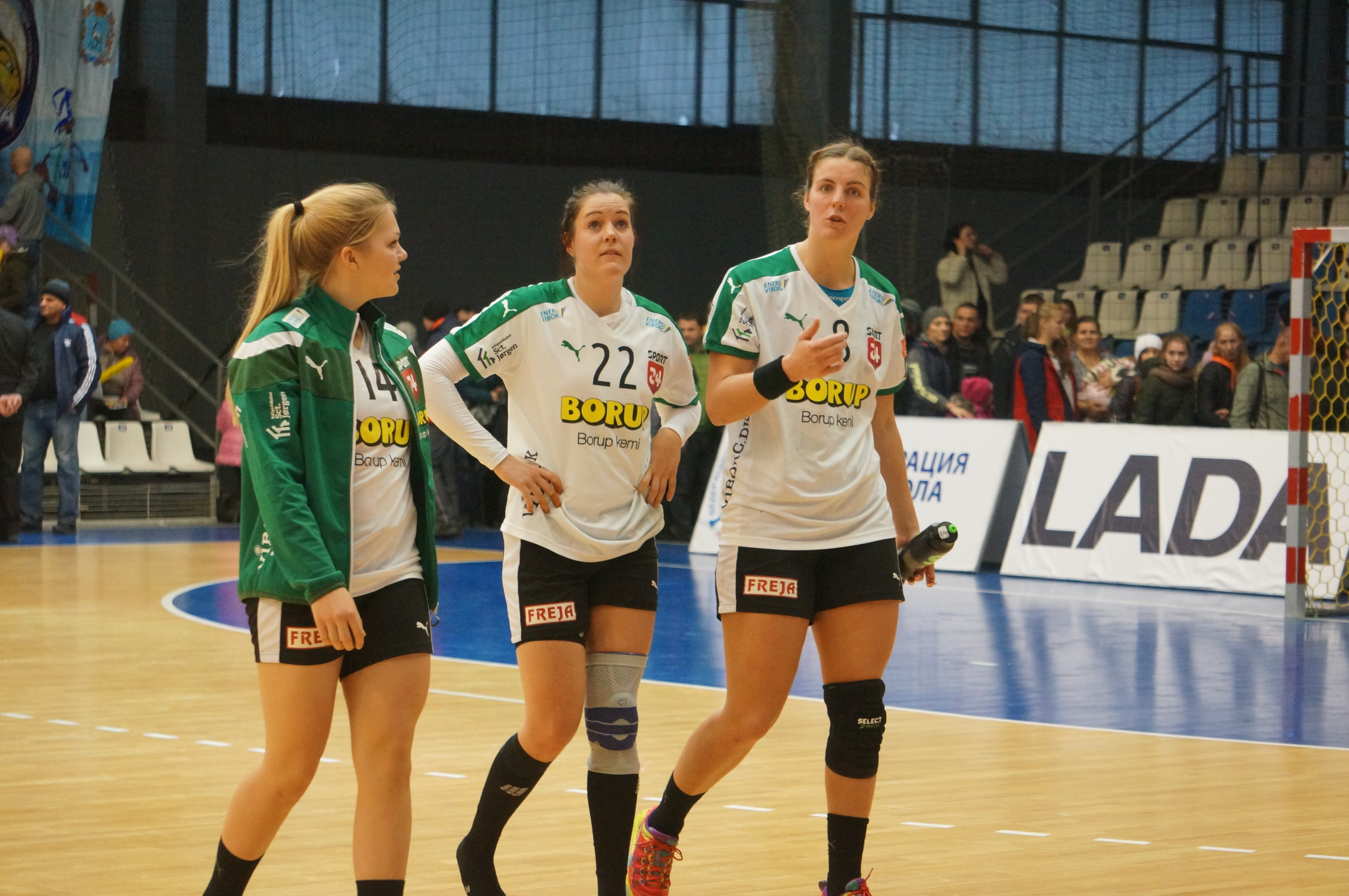 Матч Кубка ЕГФ "Лада" (Тольятти) - "Виборг" (Виборг). Тольятти, Россия, 13 ноября 2016. Игроки ГК "Виборг": Карин Стрёмберг (№8), Amalie Grøn Hansen (№14), Sidsel Bodholt Nielsen (№22)